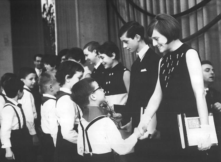 Berlin, Jugendweihe, Feierstunde Zentralbild Mittelstädt ku-gü 31.3.1968 Berlin: Jugendweihe im Kultursaal des VEB Stern-Radio In diesen Tagen erhalten zahlreiche Schülerinnen und Schüler die Jugendweihe und beginnen damit einen neuen Lebensabschnitt. Die Jugendweiheteilnehmer der 30. Oberschule Berlin-Prenzlauer Berg werden hier von Pionieren der 1. Klasse zu ihrem bedeutsamen Schritt beglückwünscht.